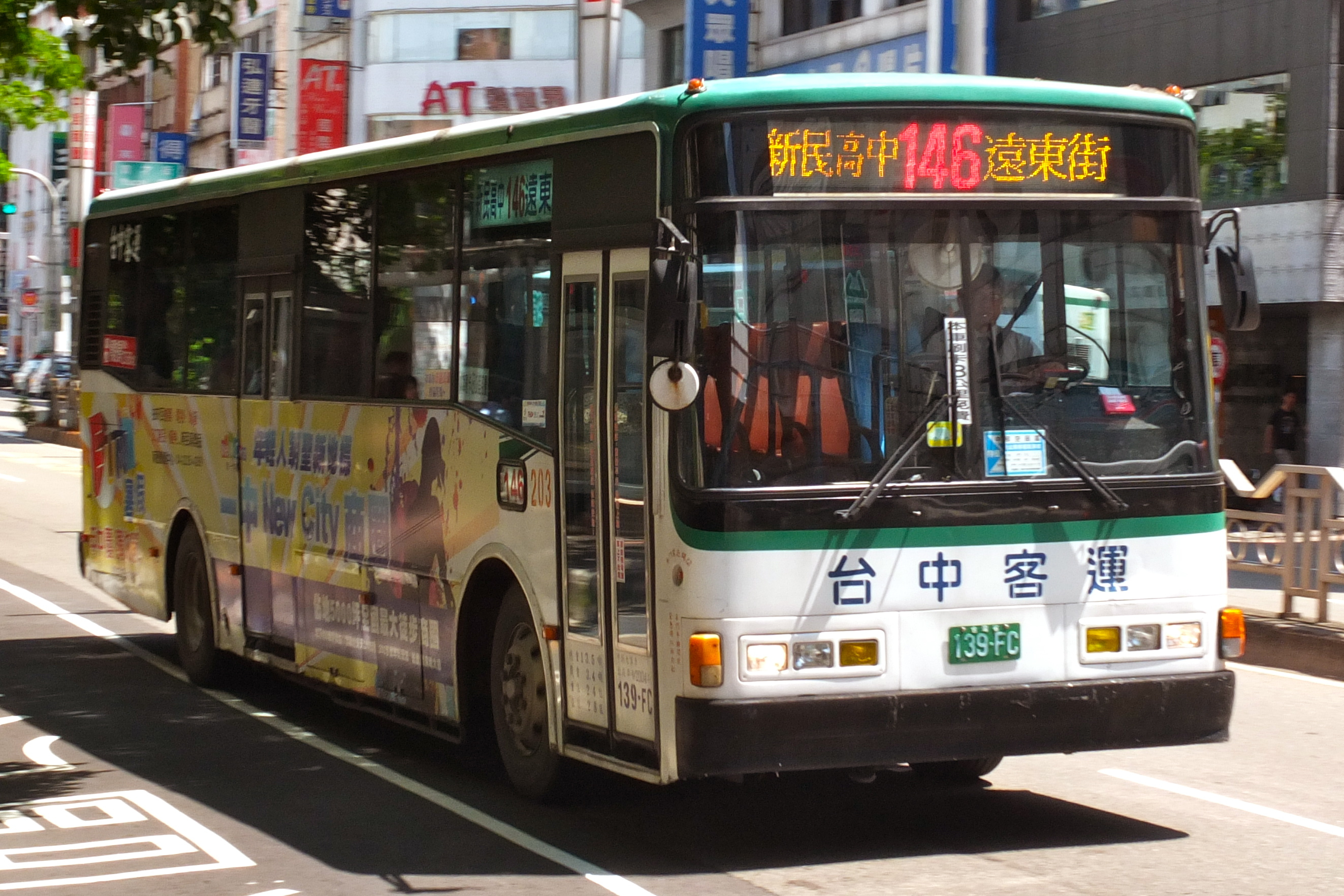 台中客運139-FC營運台中市公車146路，行駛於台中市三民路。本車為ISUZU LT134P固特車體。